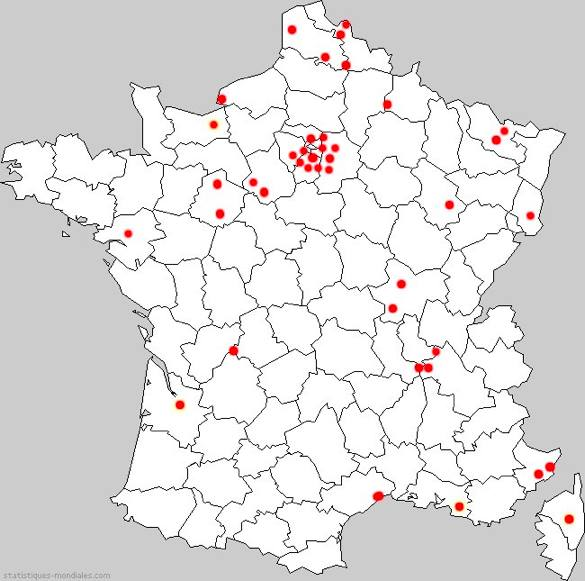 Cartographie des lieux d'internat d'excellence en France